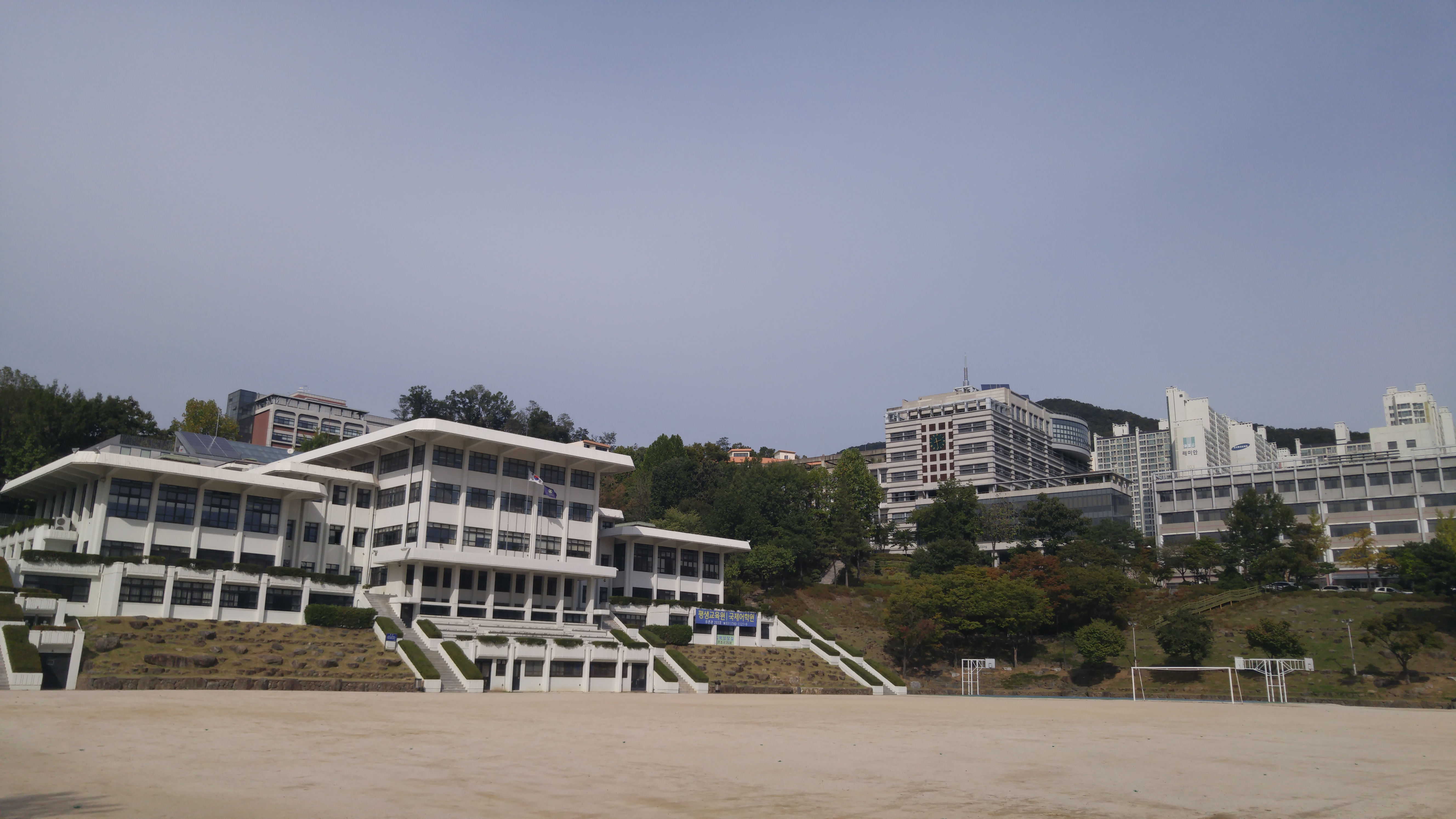 신구대학교